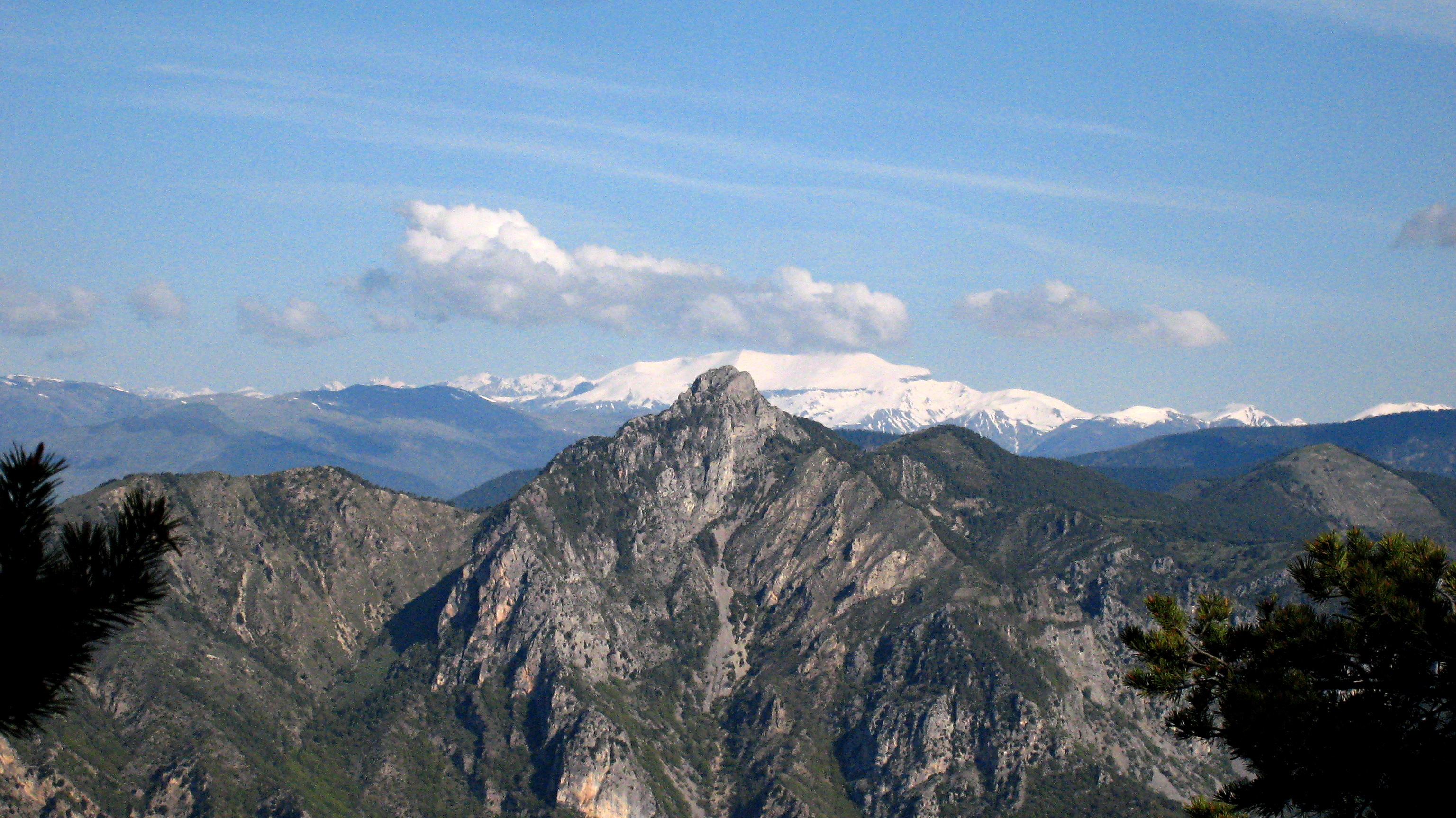 Vue du brec d'Utelle au premier plan